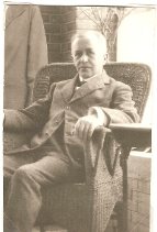 Photo d'Antoine Joseph Henry Charignon chez lui dans sa propriété de la Porte Maillot (Chine) prise en 1929